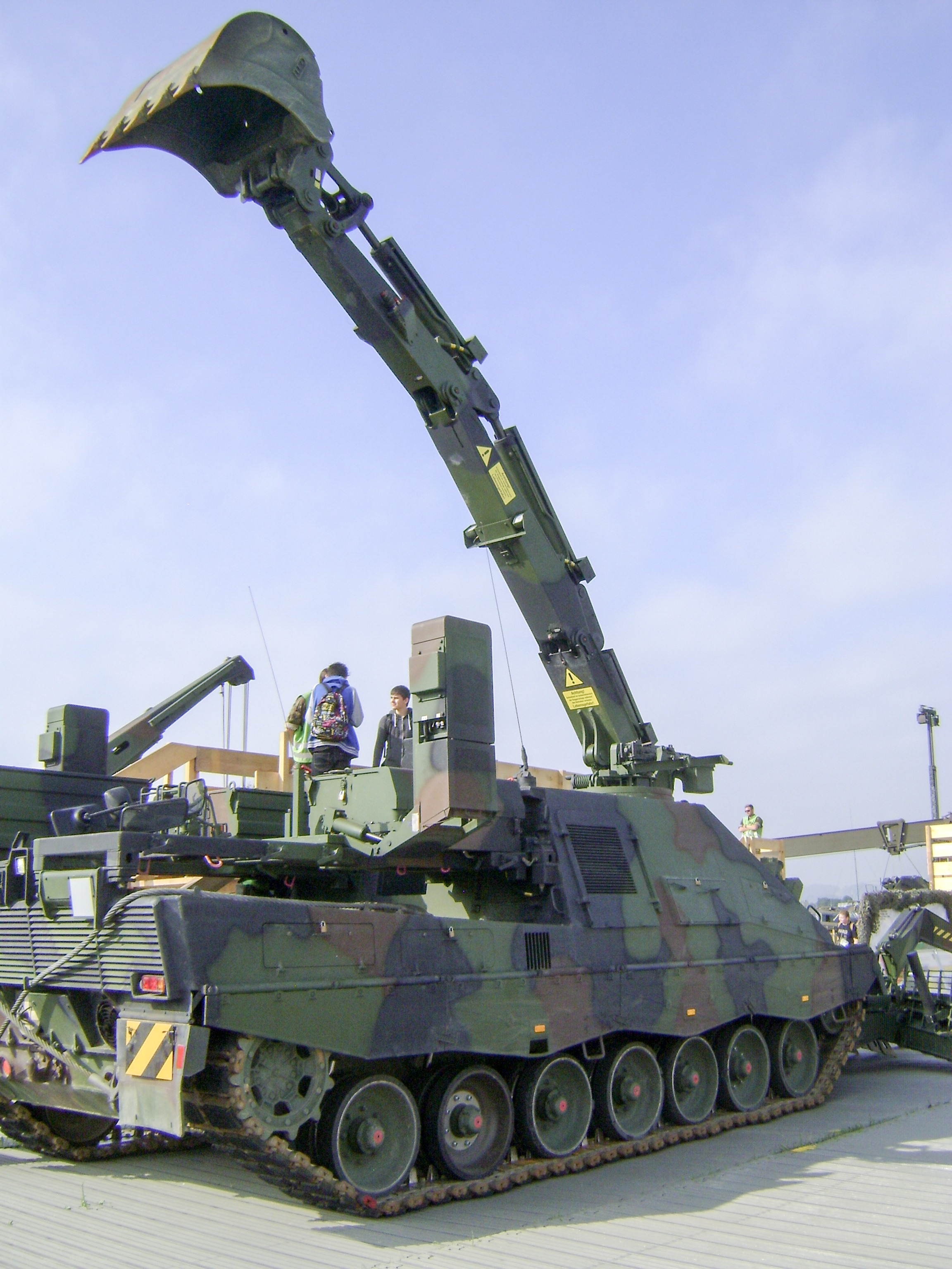 Pionierpanzer AEV3 Kodiak